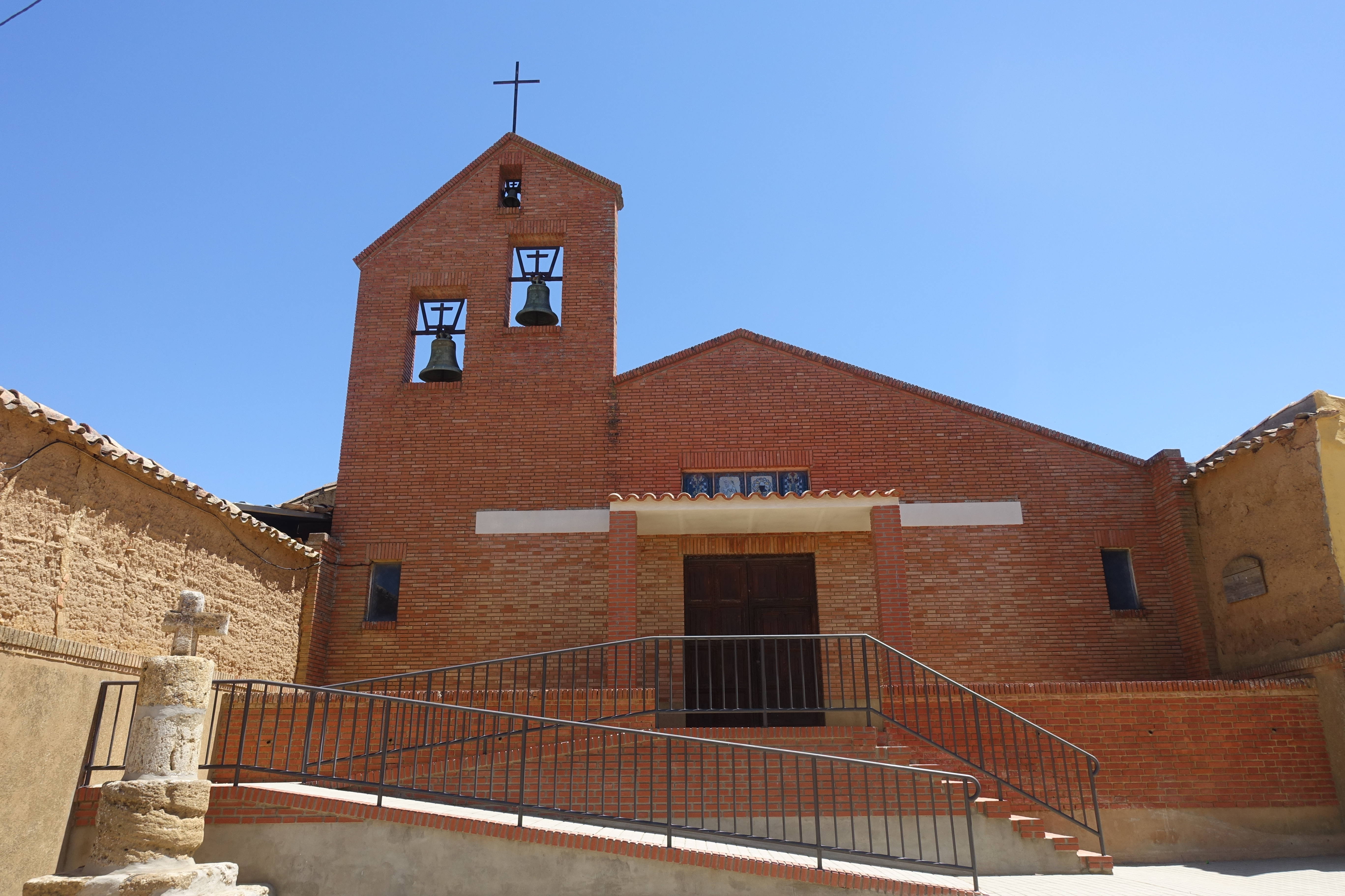 Iglesia de Santo Tomás Apóstol, en Pozuelo de la Orden (Valladolid, España).